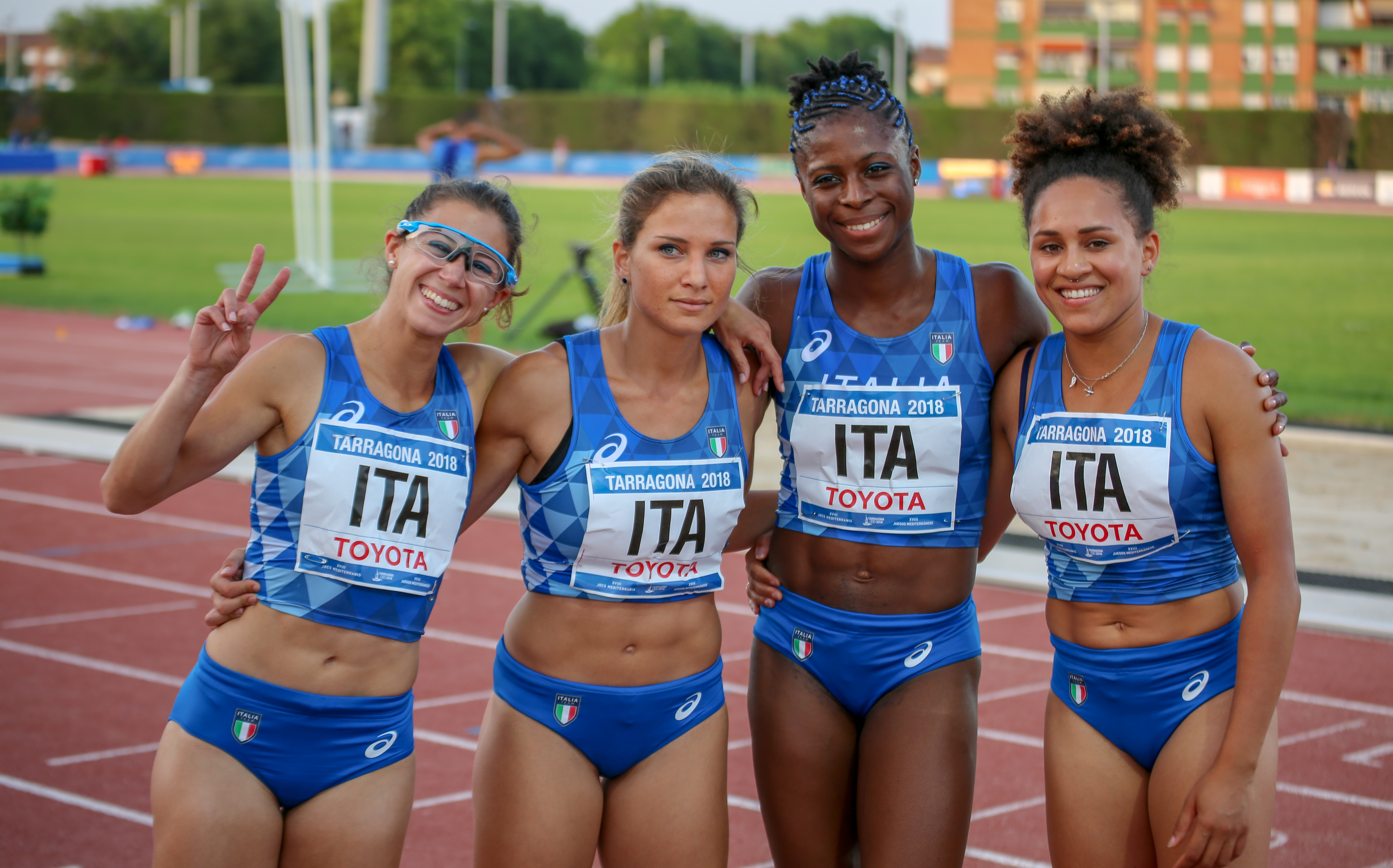 Italia en los relevos 4x100 en los Juegos del Mediterráneo 2018 (Gloria Hooper, Irene Siragusa, Anna Bongiorni, Johanelis Herrera Abreu)